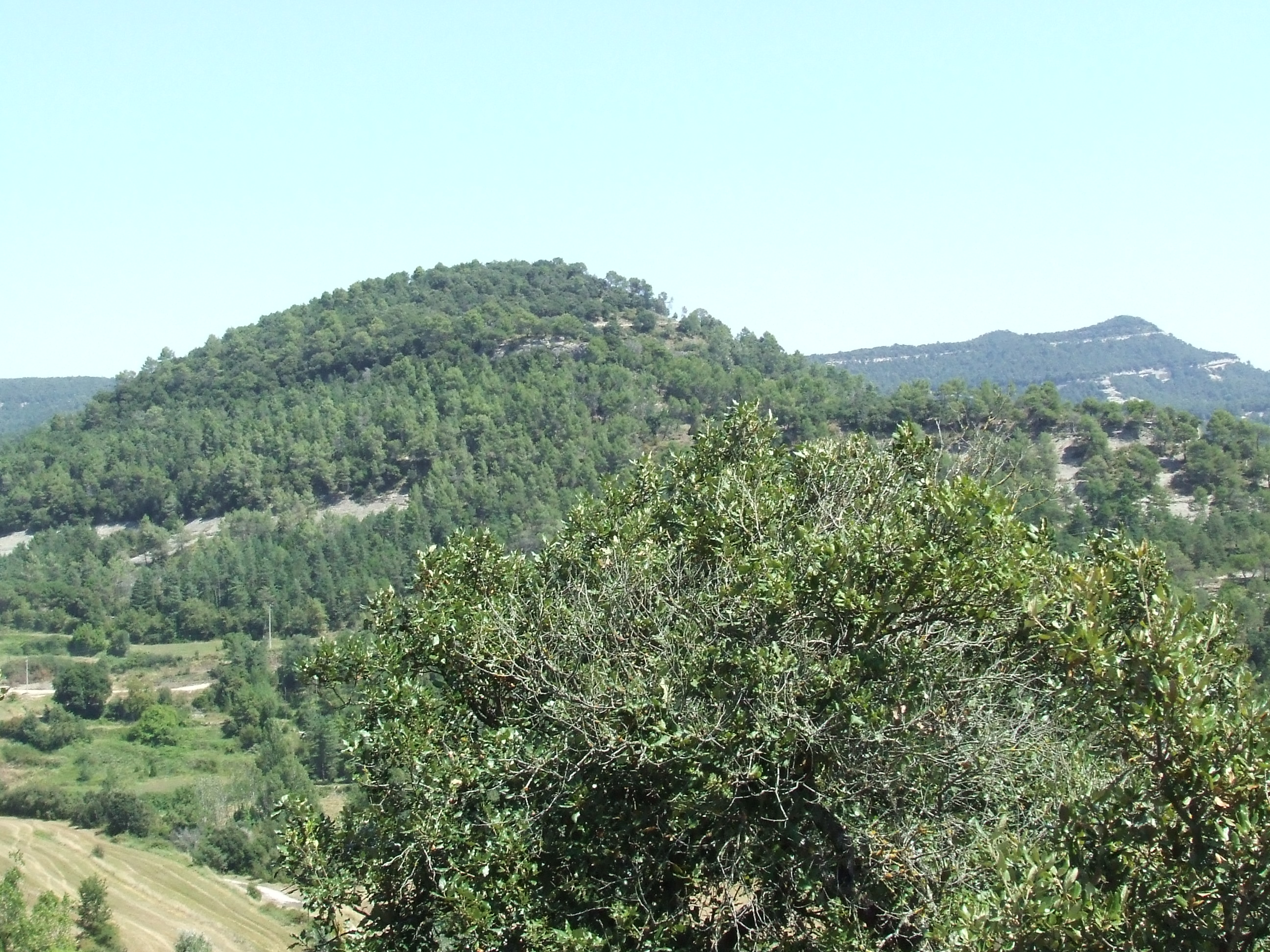 El Gurugú (Castellcir, Moianès)